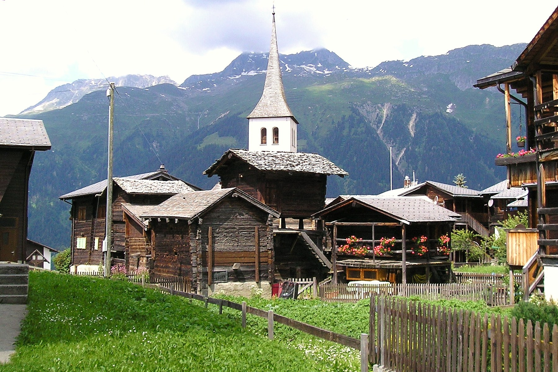 Dorfkern mit Kirche von Bellwald im Kanton Wallis